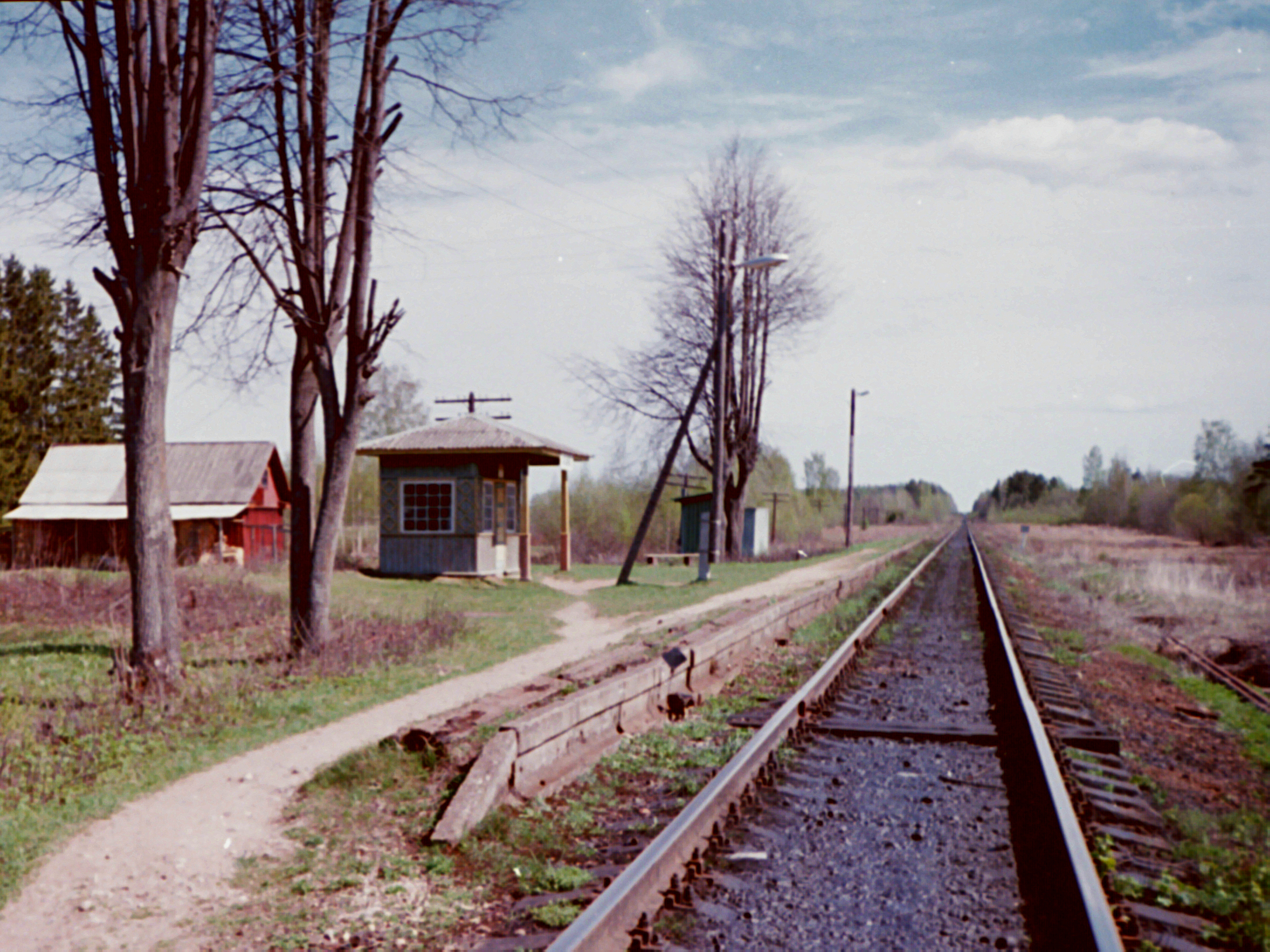 Holvandi raudteepeatus